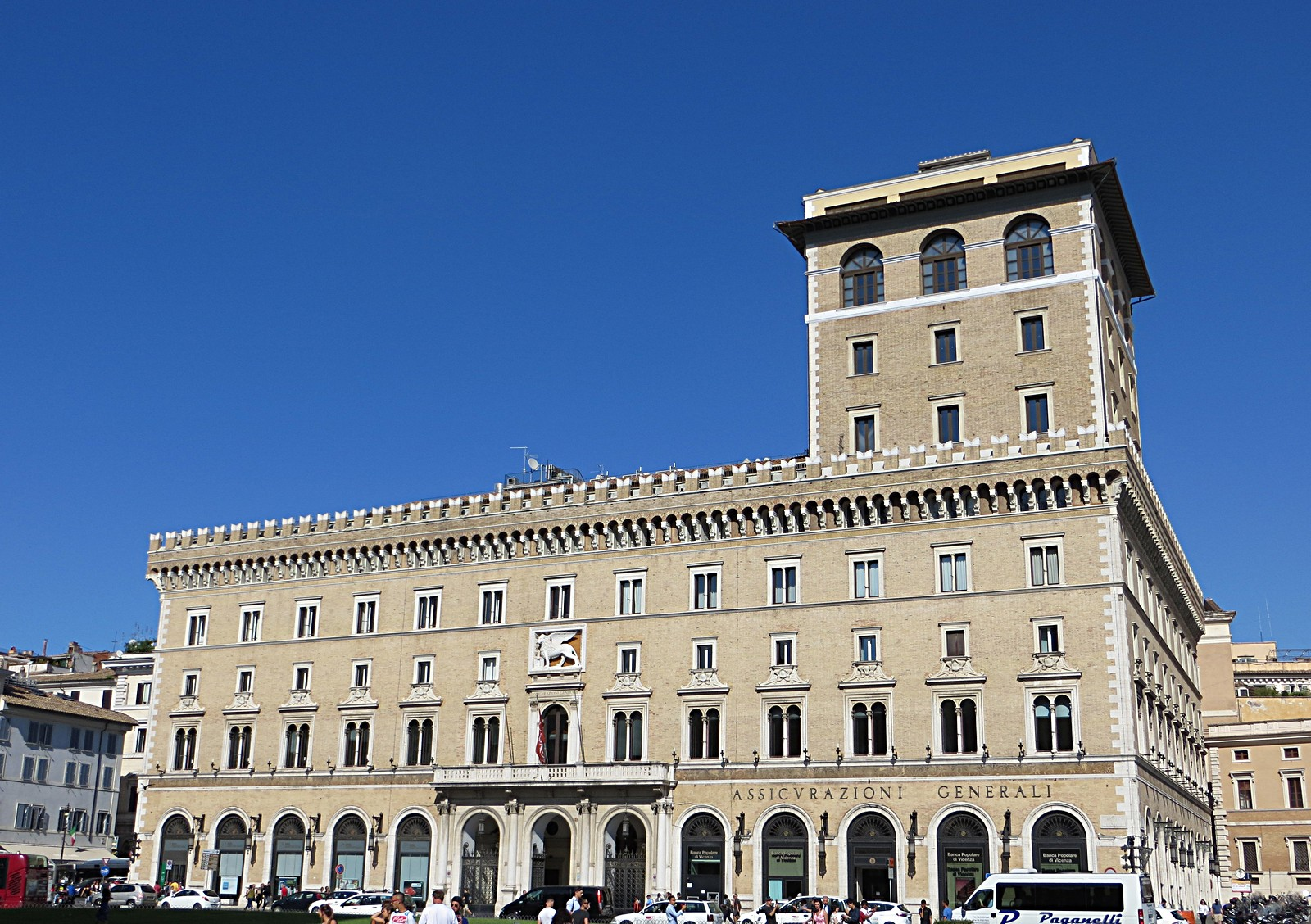 Basilica di San Marco Evangelista al Campidoglio